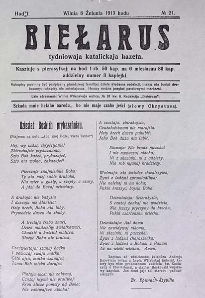 Газета "Беларус", №21 ад 8.8.1913, тытульная старонка з вершам Б. Эпімах-Шыпілы «Дзесяць Боскіх прыказанняў». «Запісаў Б. Эпімах-Шыпіла ад ксяндза Андрэя Буевіча, былога пробашча касцёла Святой Кацярыны ў Пецярбургу, цяпер Маскоўскага вайсковага капелана, які чуў іх ад падкасцельных старцаў» Беларуская (тарашкевіца): «Дзесяць Боскіх прыказанняў». «Запісаў Б. Эпімах-Шыпіла ад ксяндза Андрэя Буевіча, былога пробашча касцёла Святой Кацярыны ў Пецярбургу, цяпер Маскоўскага вайсковага капелана, які чуў іх ад падкасцельных старцаў»